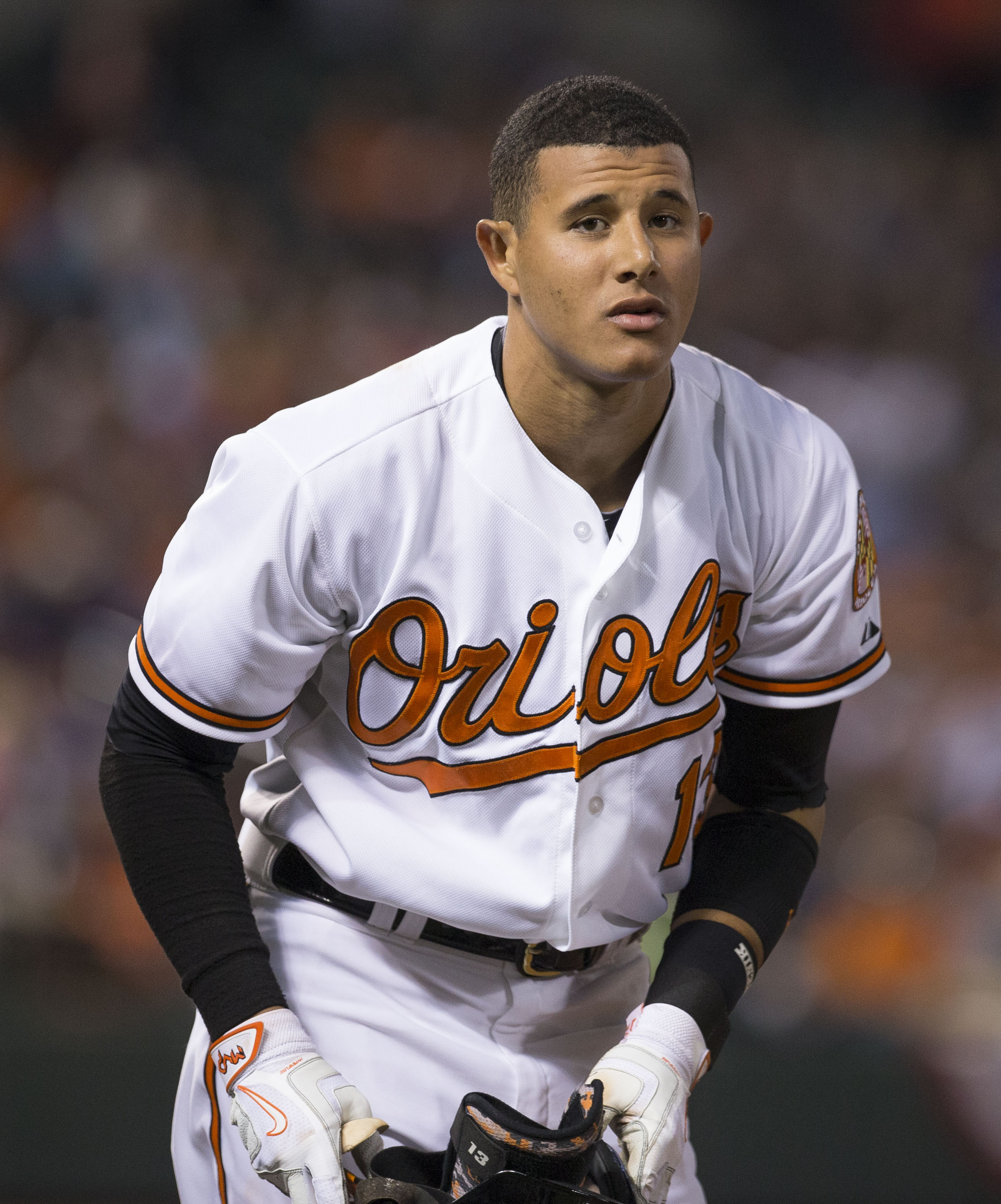 Yankees at Orioles 04/13/15